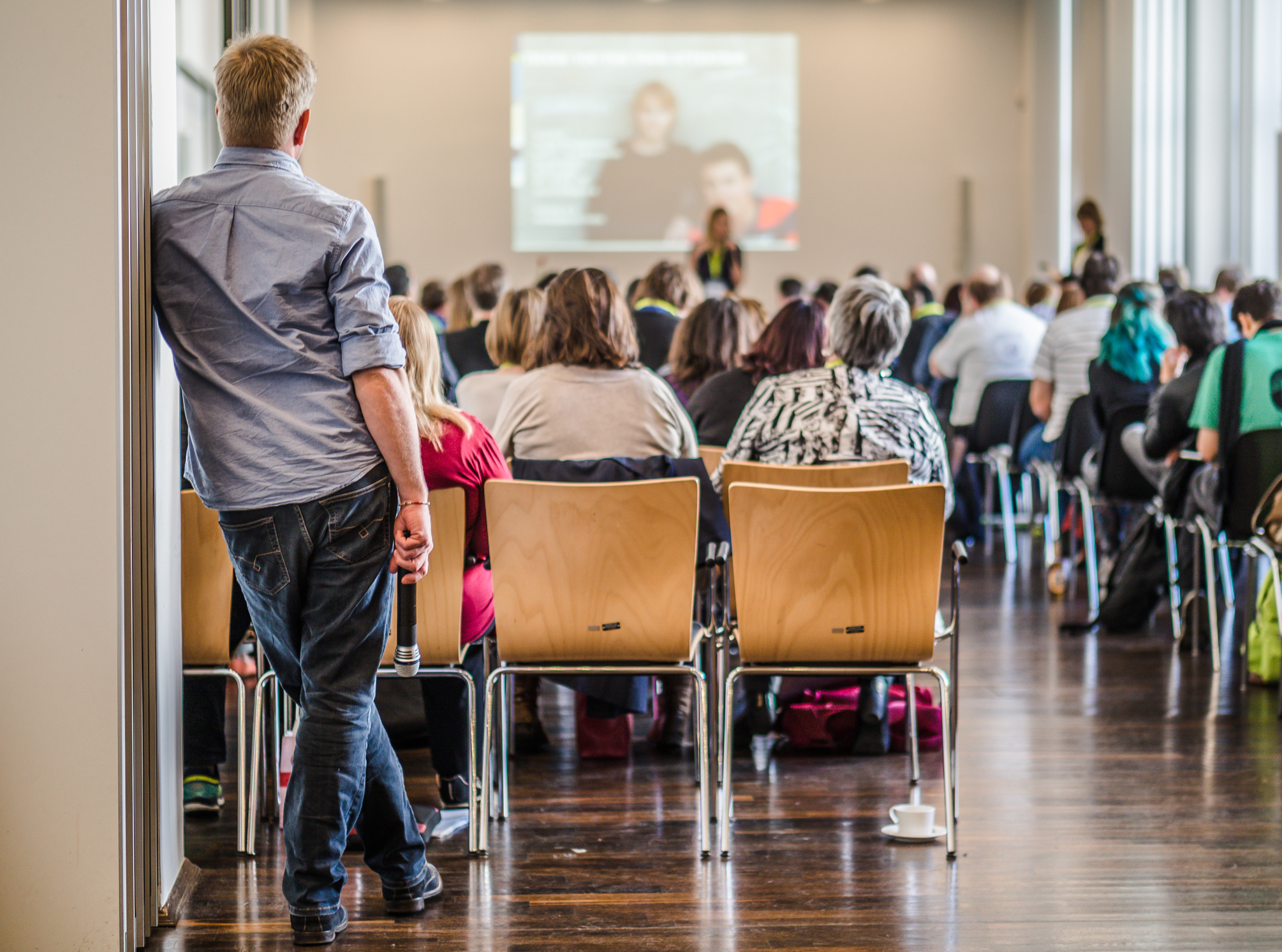 Wikimedia Conference 2016.